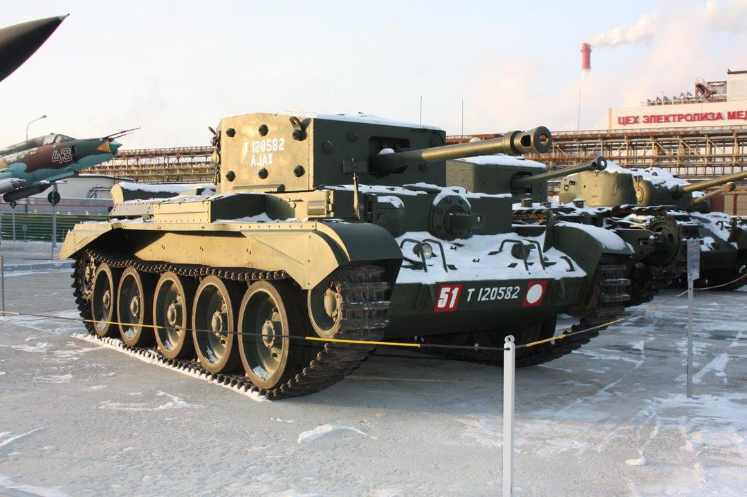 Cruiser Mk. VIII Cromwell в Музее военной техники УГМК